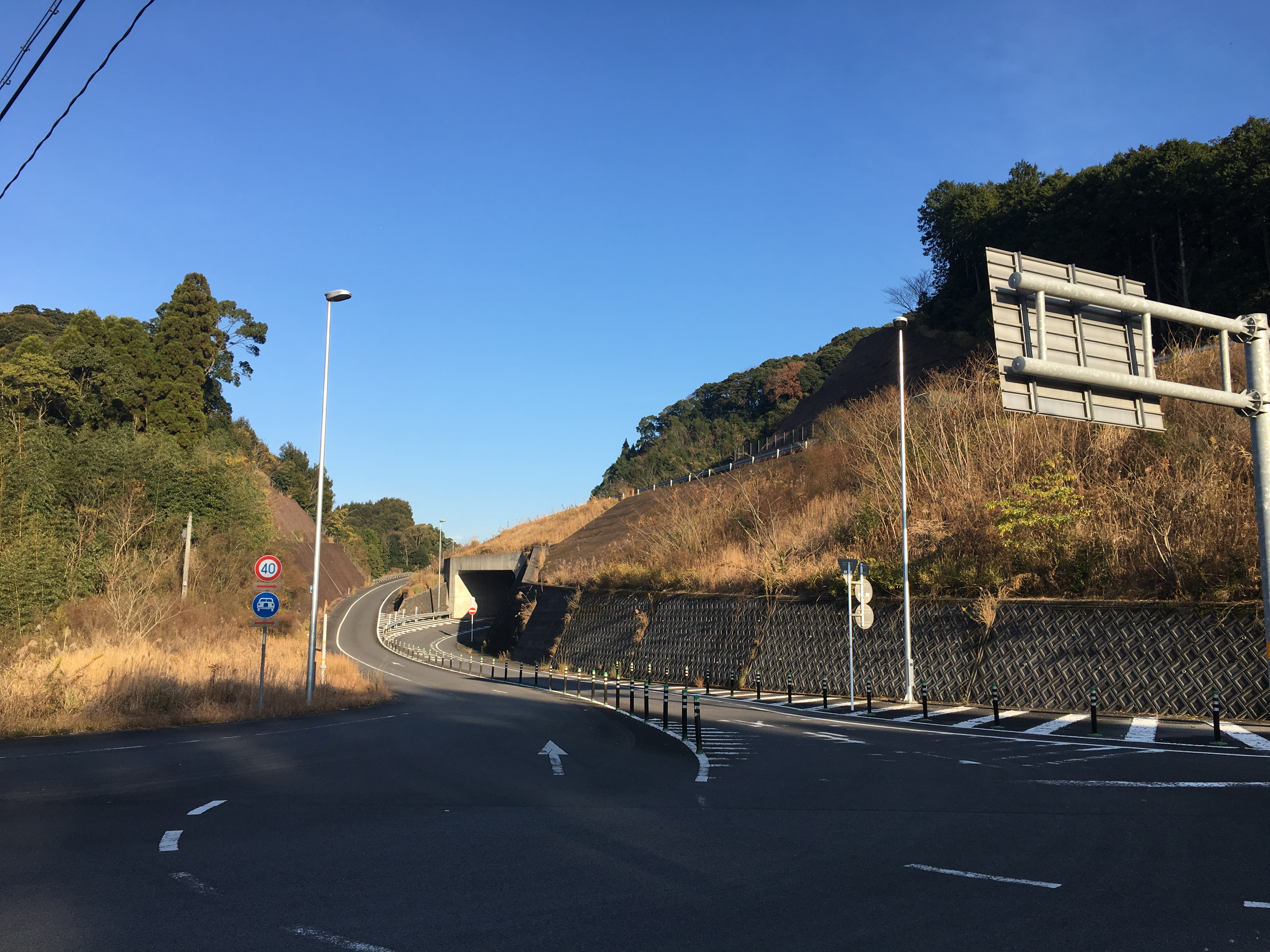 北薩横断道路のさつま観音滝インターチェンジ（鹿児島空港方面）出入口。